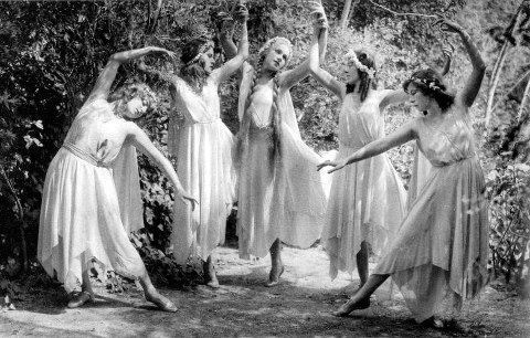 Spettacoli teatrali al Teatro Greco di Siracusa